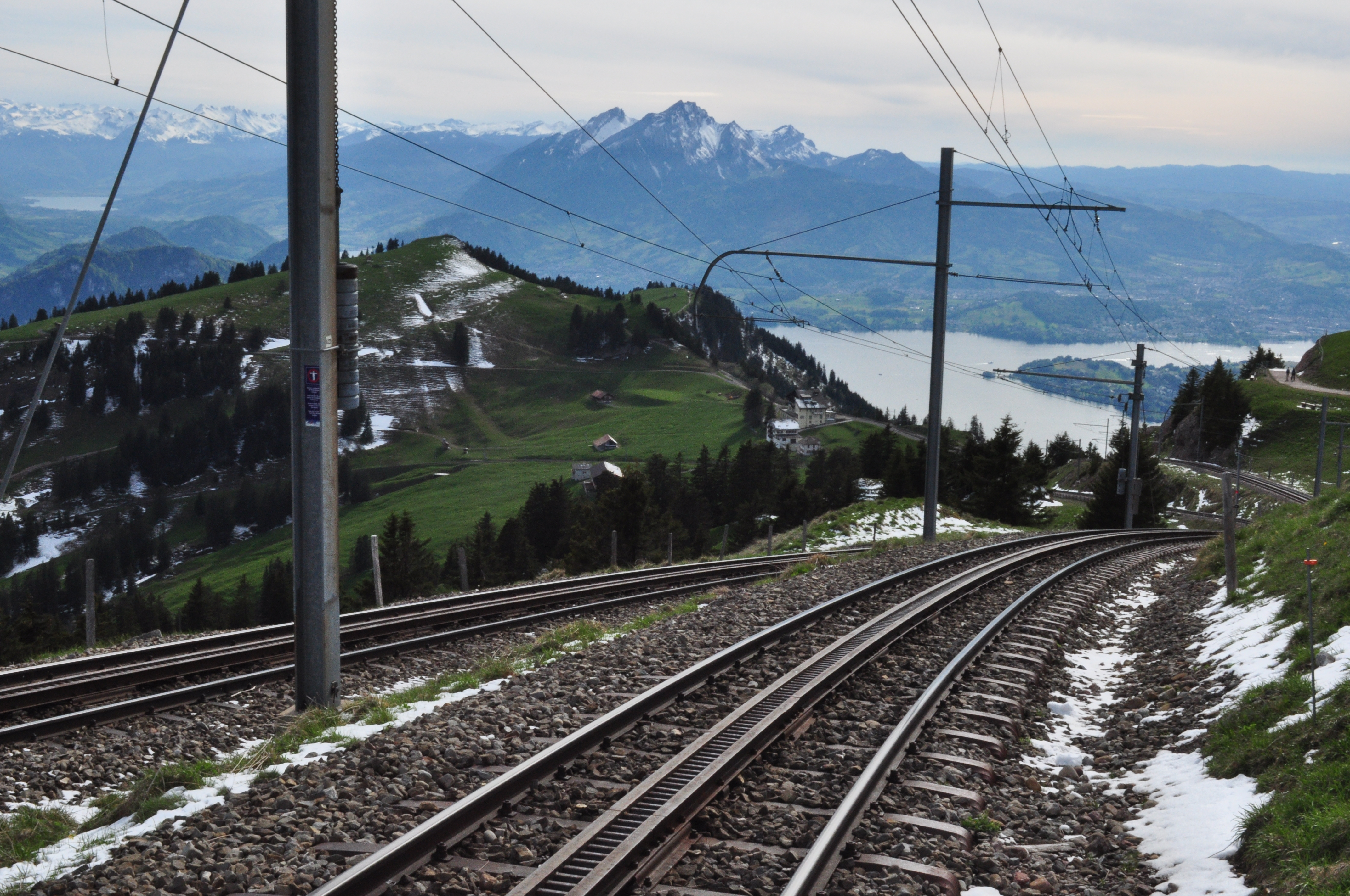 La descente depuis la gare supérieure du Rigi Kulm. On voit la crémaillère au premier plan. Au fond, le lac des 4 cantons.